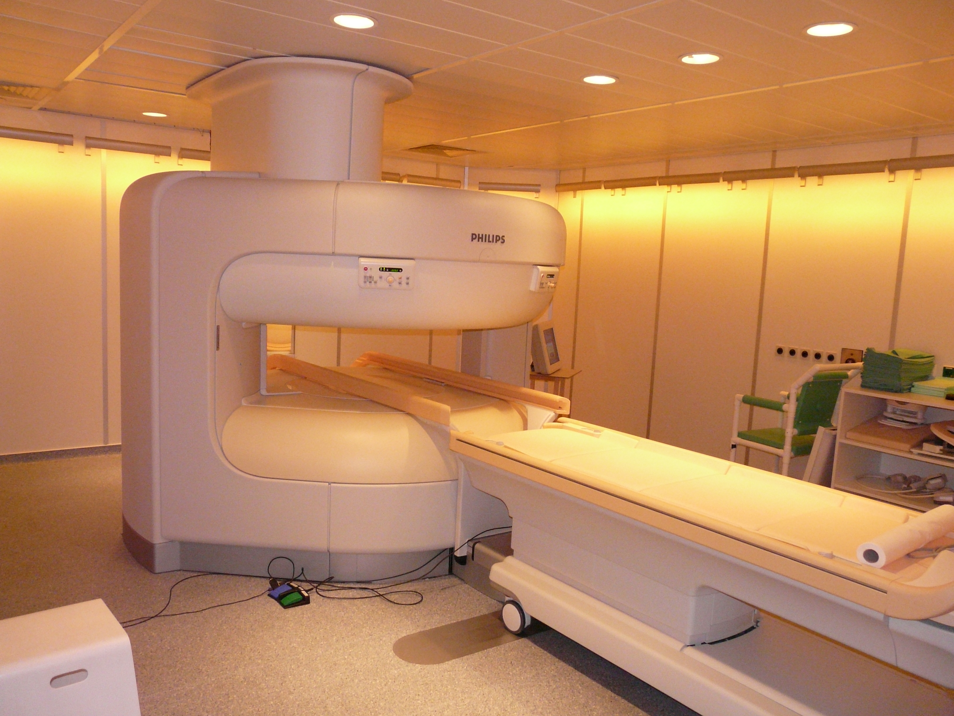 Offener Magnetresonanztomograph "Philips Panorama 1,0T" an der Klinik für diagnostische Radiologie des Universitätsklinikums Magdeburg